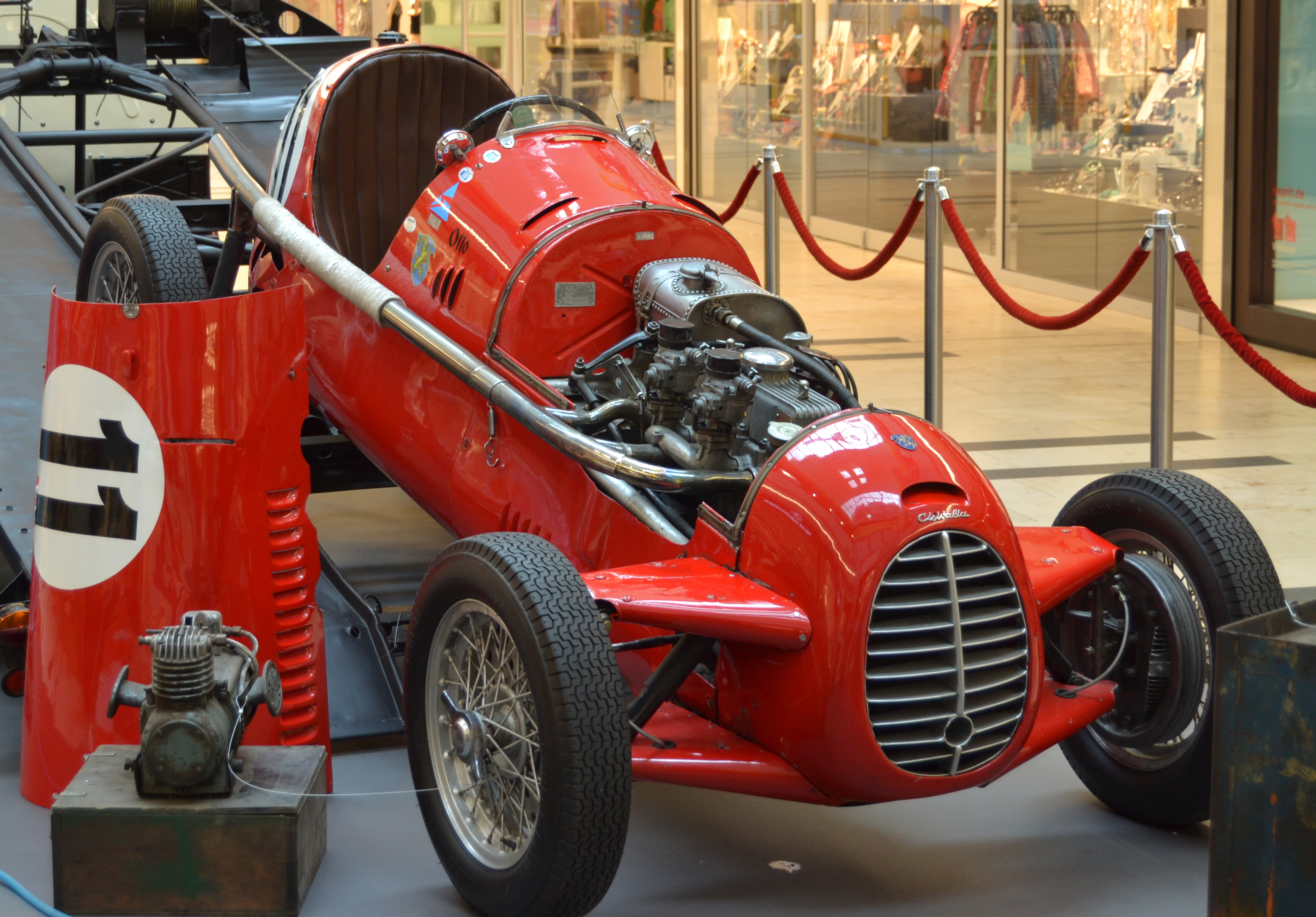 Original 1946 Cisitalia D46, 1090 ccm, 68 PS, 182 km/h, 370 kg, Chassis Nummer 0027. Mit diesem Wagen gewann Hans Struck 1947 das erste offielle Nachkriegsrennen in Deutschland auf dem Hockenheimring